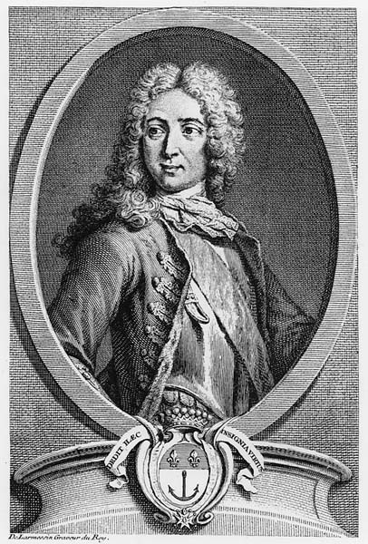 Portrait de Guay-Trouin, d'après une gravure de l'époque.